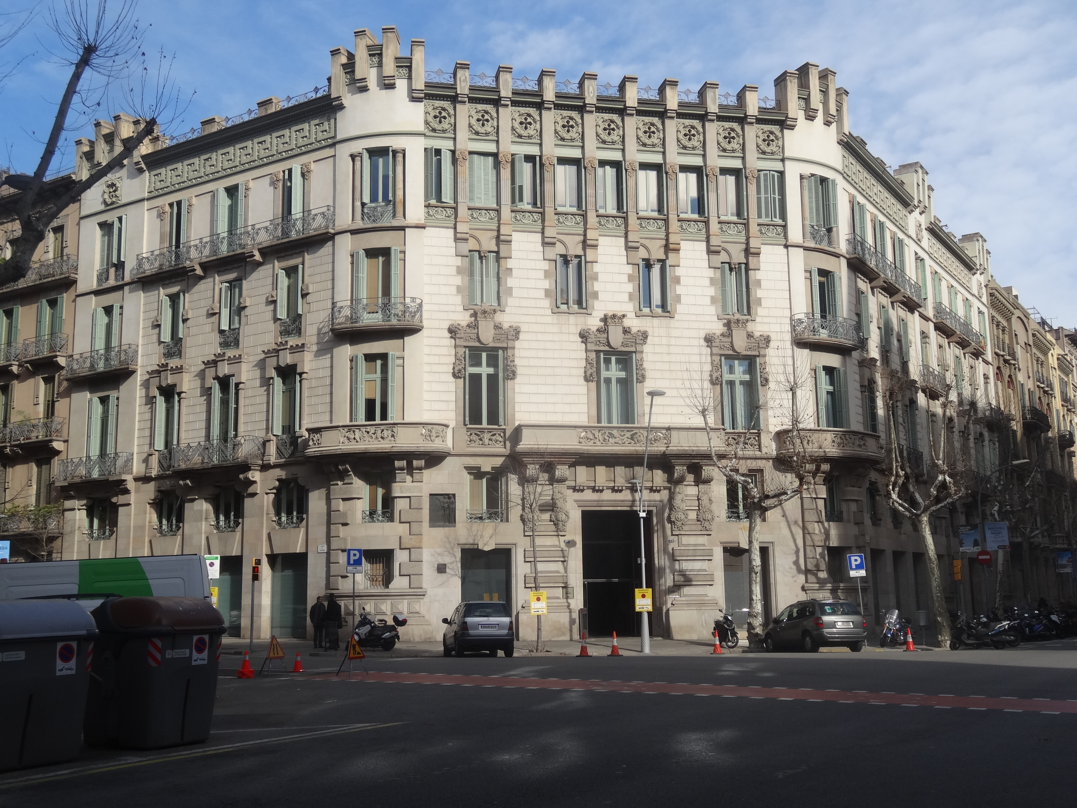 Casa Antoni Roger - Seu de l'Escola d'Administració Pública de Catalunya